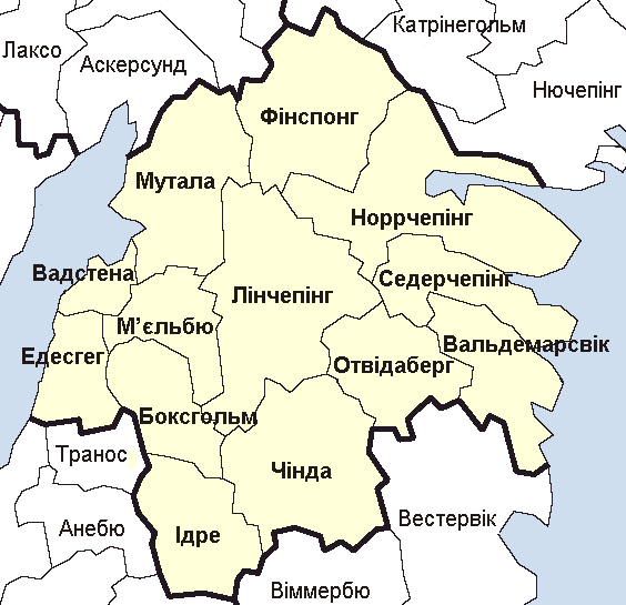 Карта адміністративного поділу лену Естерйотланд у Швеції. Карту створено на основі карти File:Östergötland County.png.